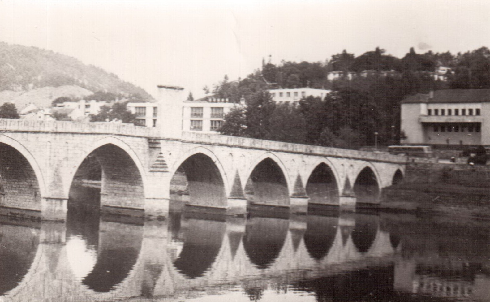 Мост на Дрини Вишеград 1977.